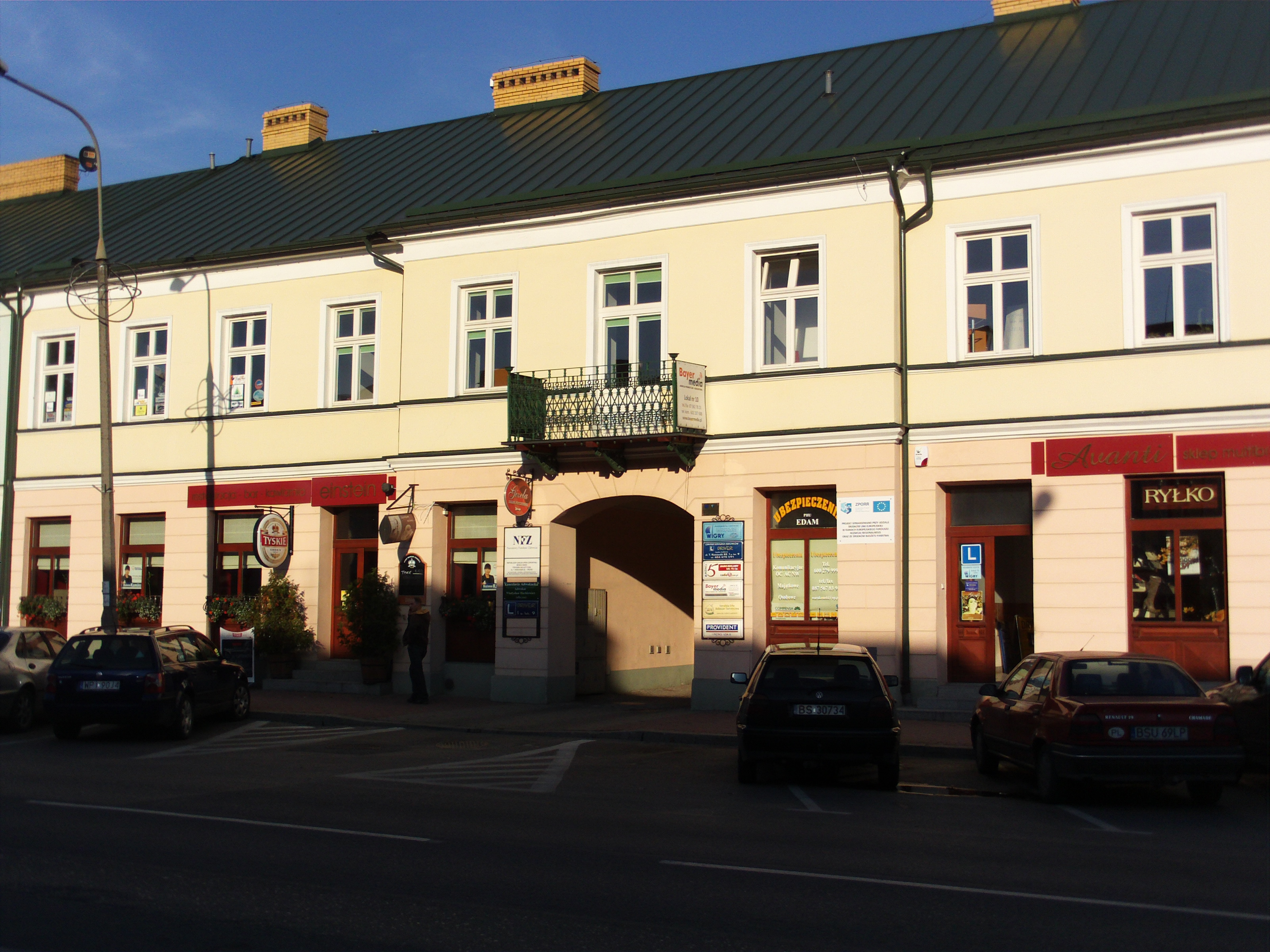 Suwałki ul. Kościuszki 82